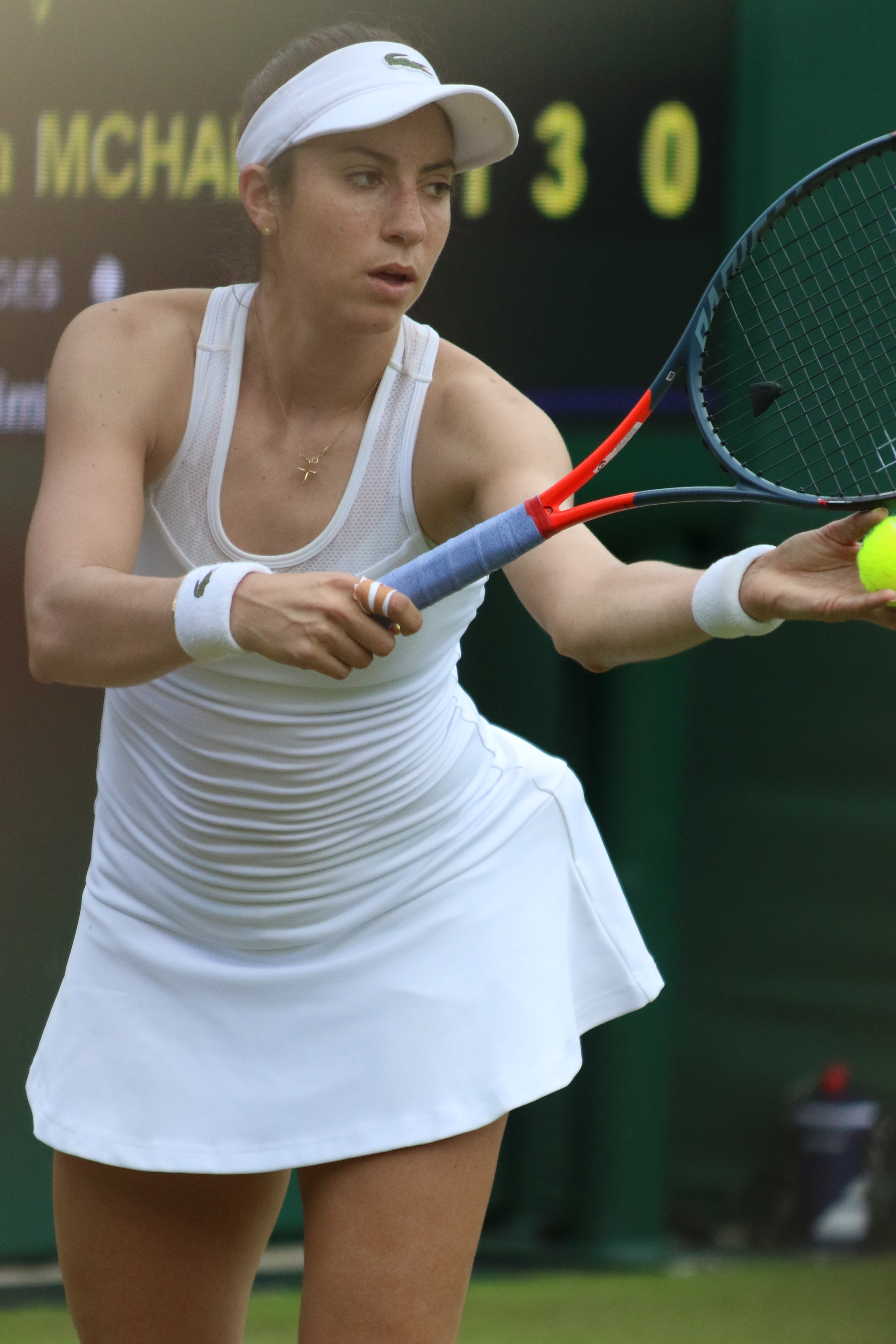 McHale WM19 (31)